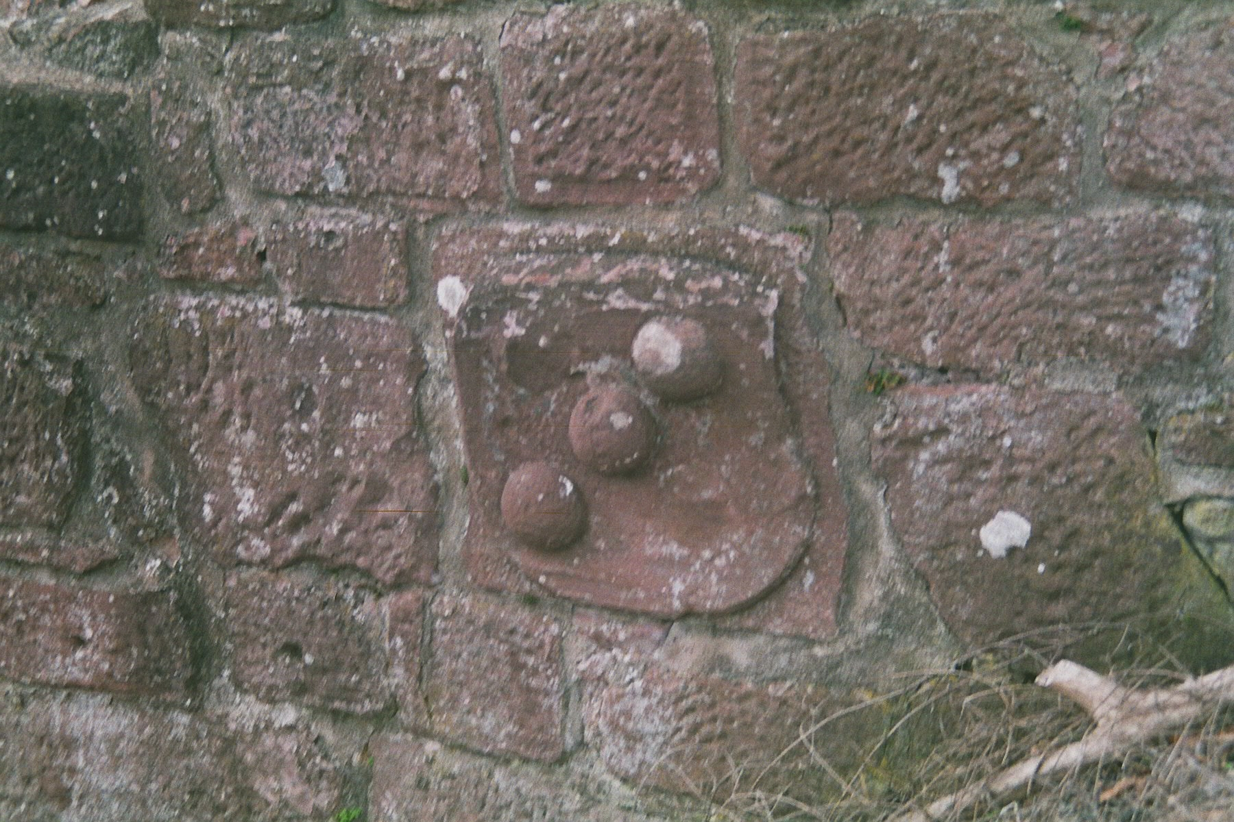 Wappenstein derer v. Sickingen am großen Rondell